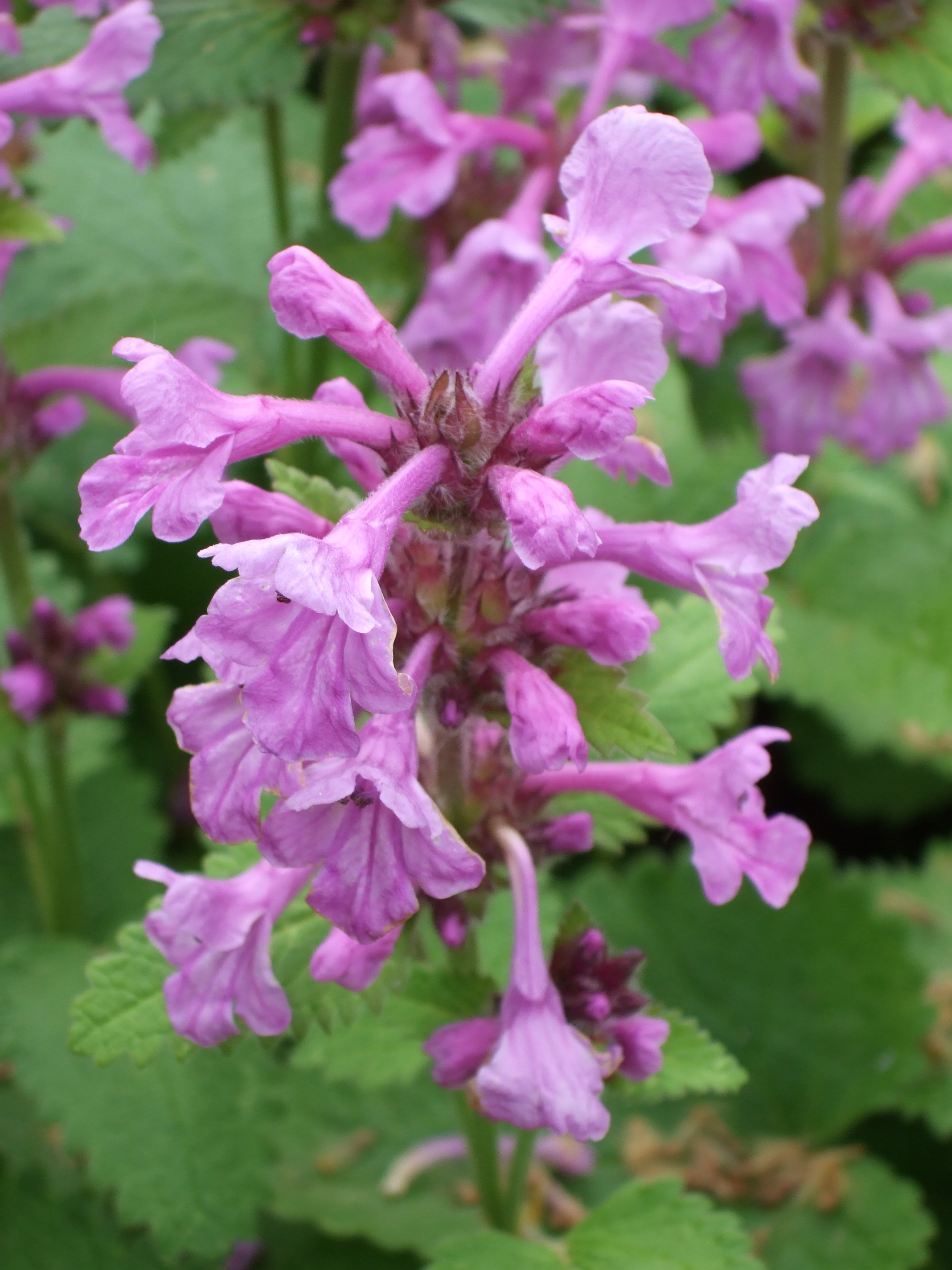 Stachys macrantha 'Superba'